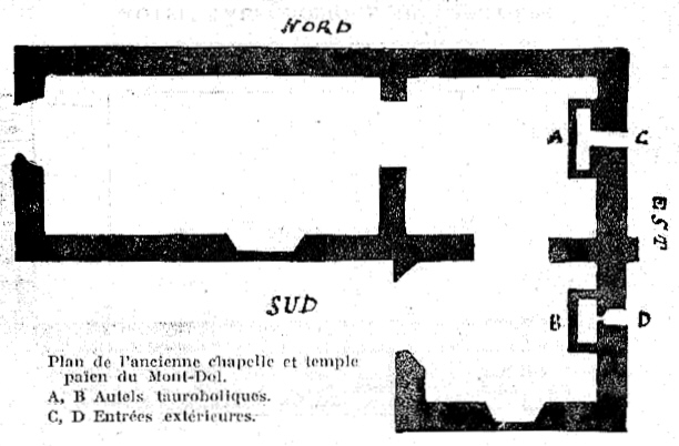 Plan de l'ancienne chapelle et du temple païen du Mont-Dol. A,B : autels tauroboliques. C, D : entrées extérieures.